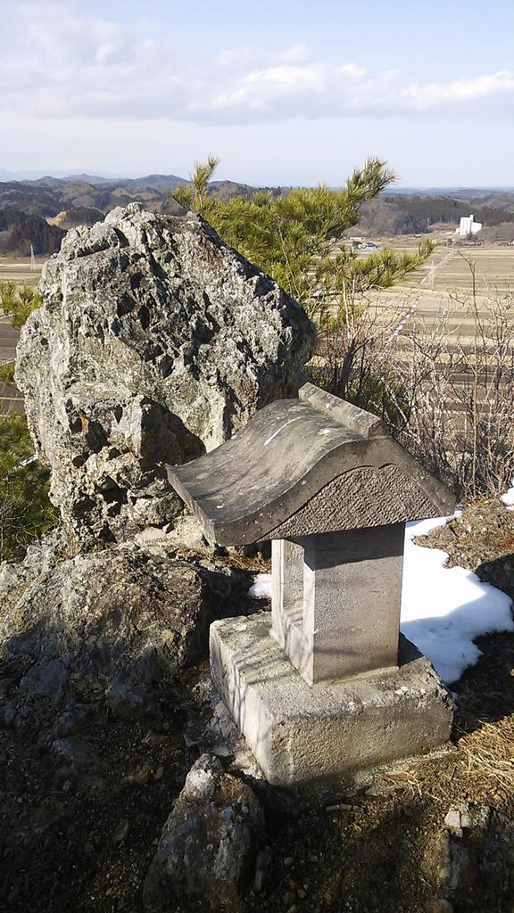 武鉾山山頂